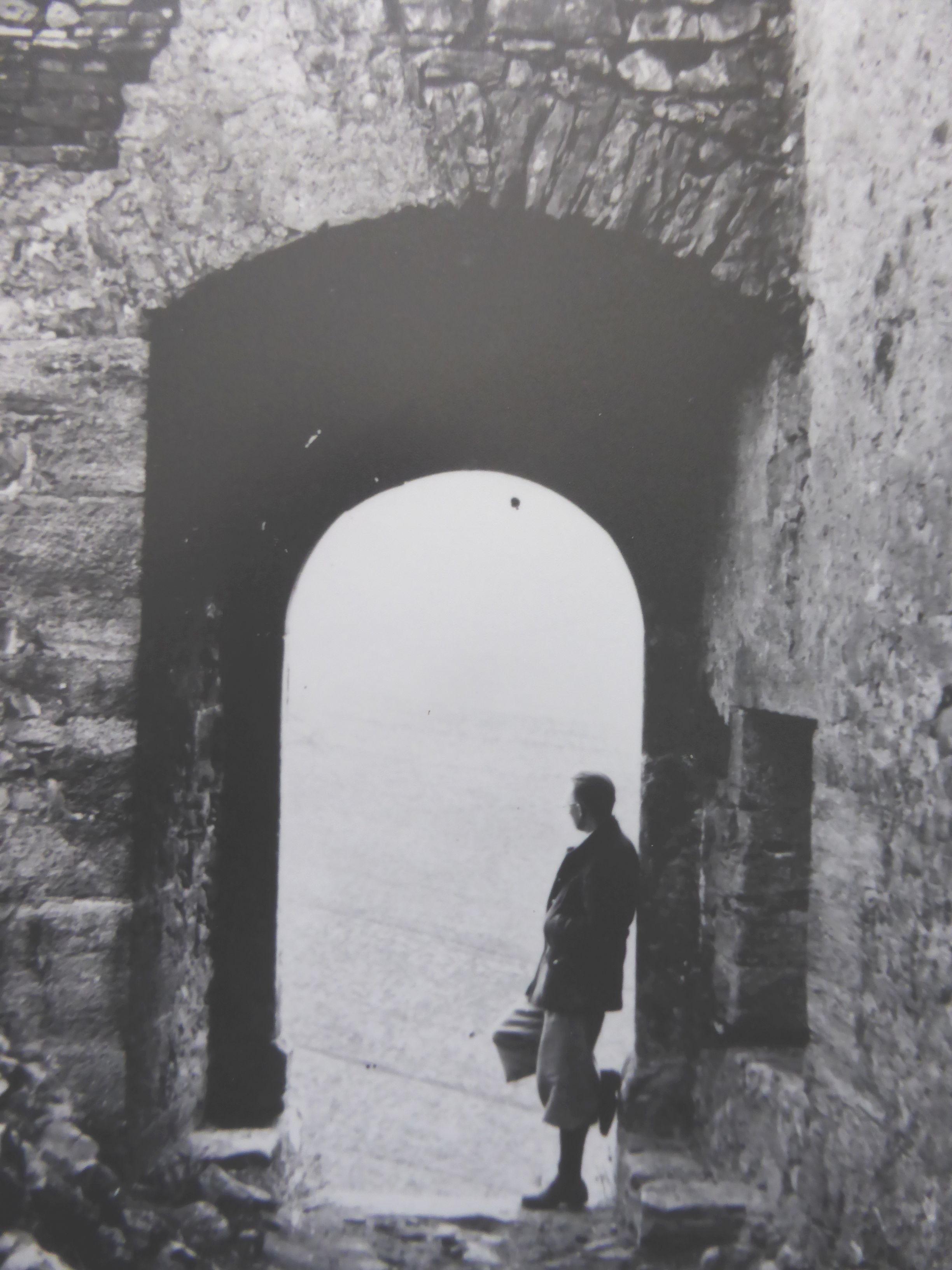 Georg Rauchenberger (1942)